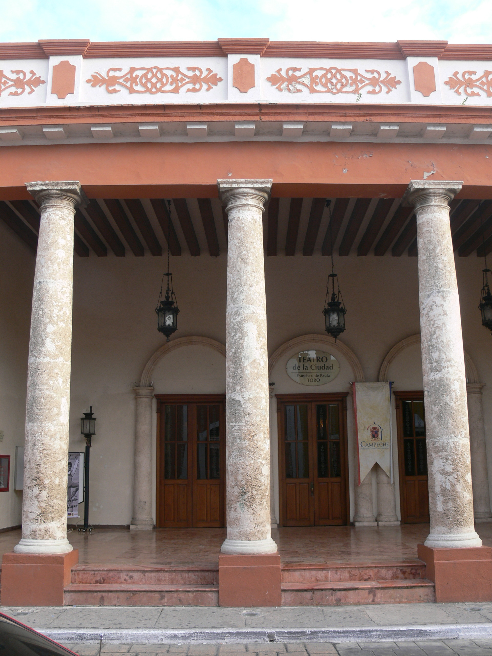 San Francisco de Campeche. Francisco de Paula Toro-Theatre, (1832 - 1834).